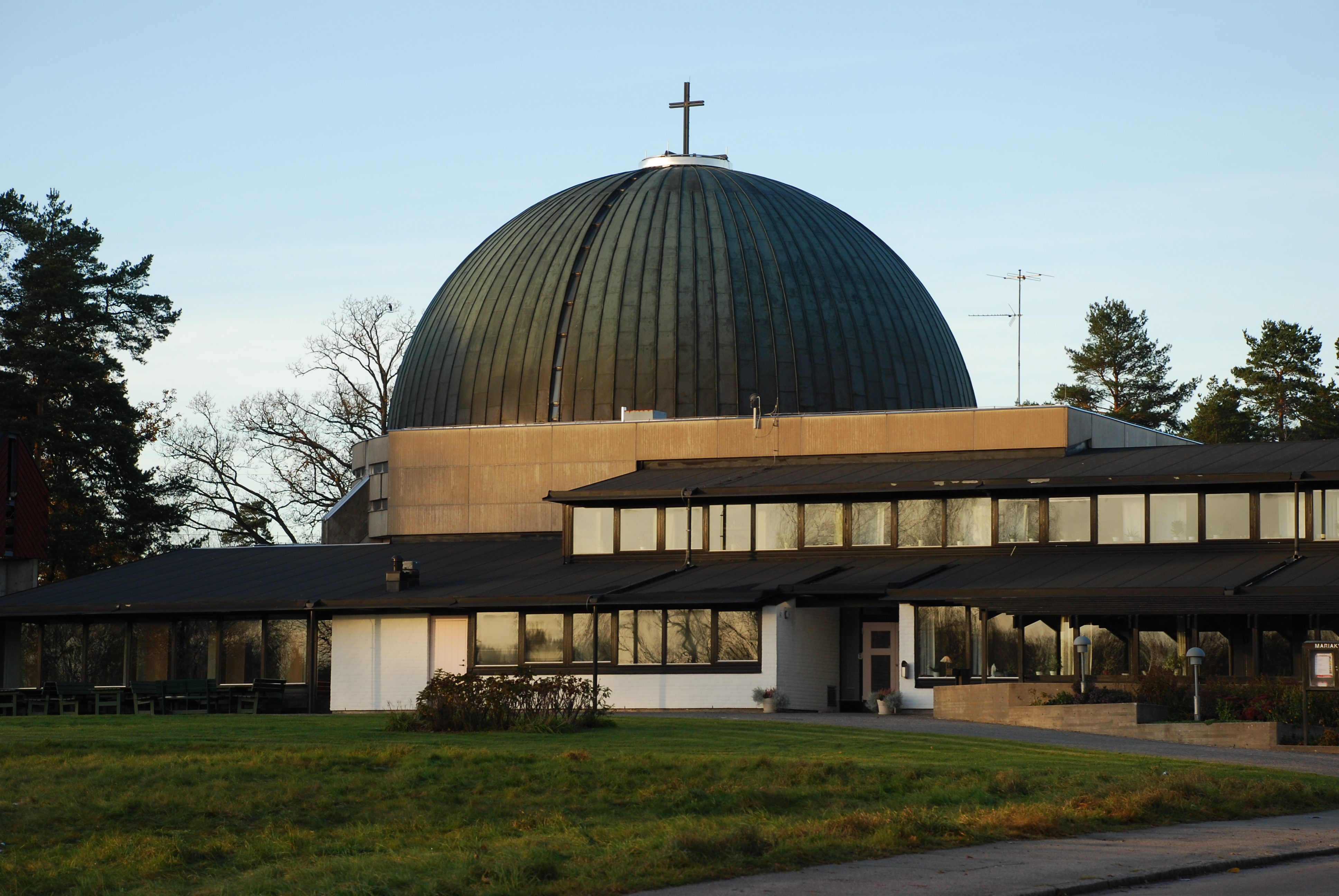 Mariakyrkan i Växjö (Hovshaga), byggd 1979